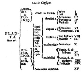 Darstellung der Systematik von Cesalpino in Carl von Linnés Classes Plantarum, 1. Auflage, 1738, S. 3.